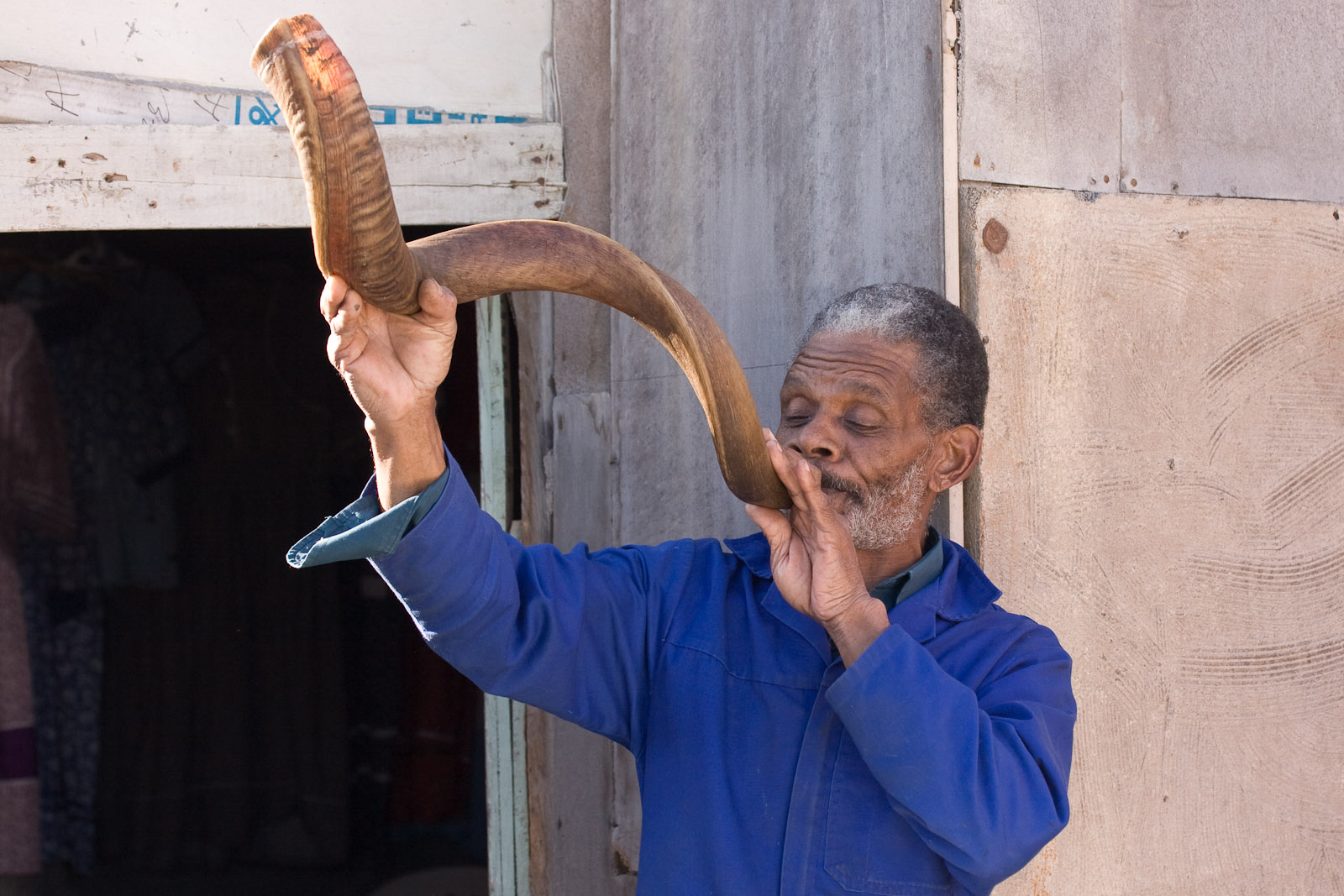 Nama man greeting us